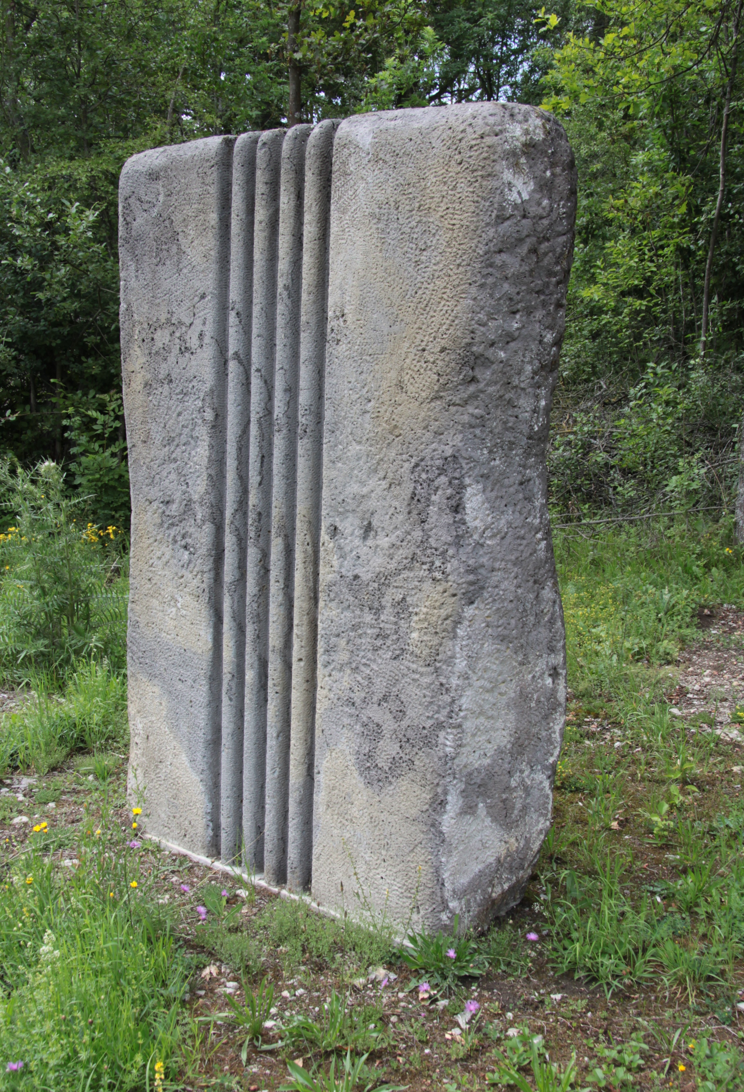 Karl Prantl: Die fünf Parallelen. 1. Internationales Steinbildhauersymposion in Gaubüttelbronn, 1961